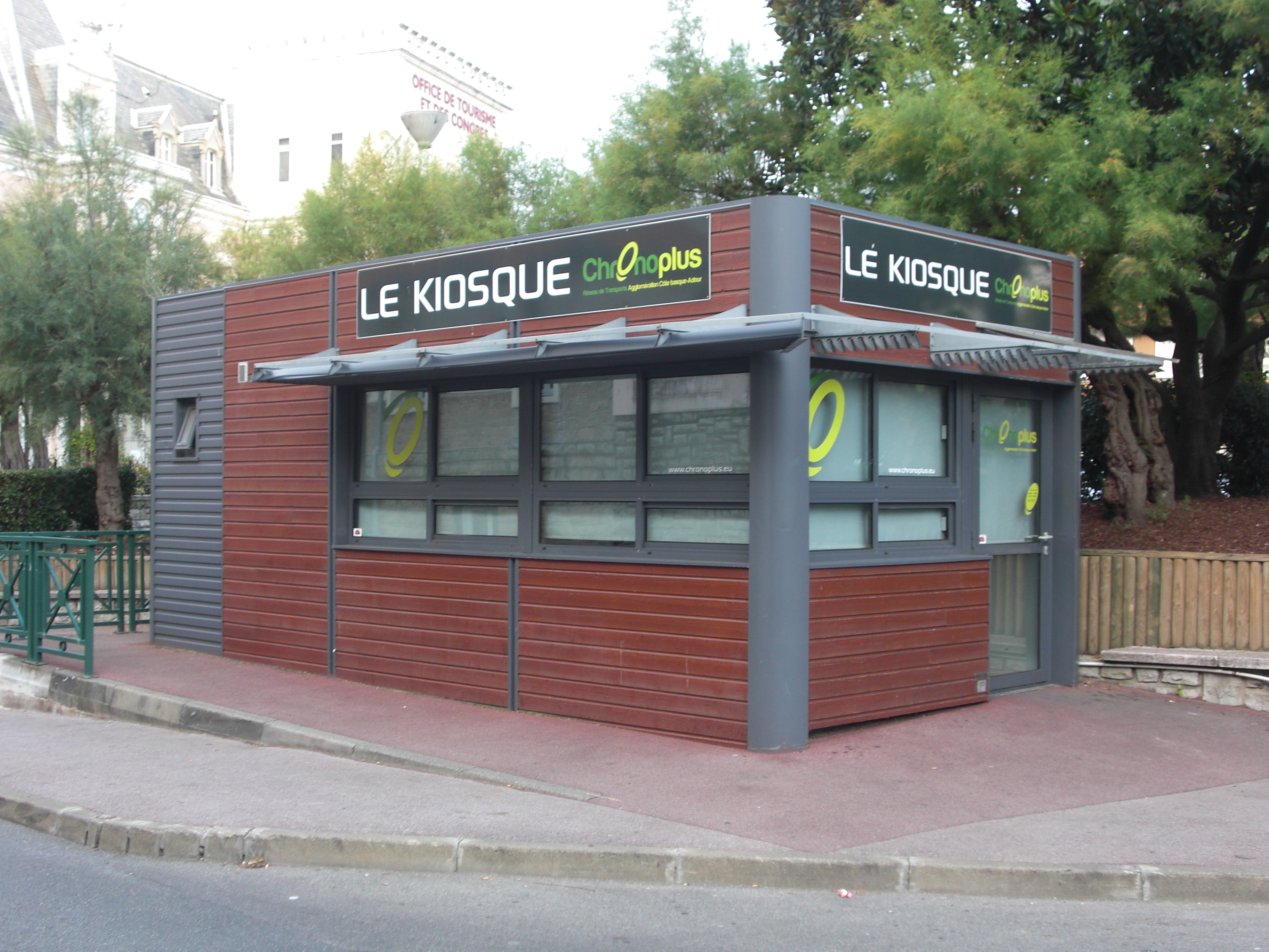 "Le Kiosque", boutique commerciale de Chronoplus derrière la mairie de Biarritz.